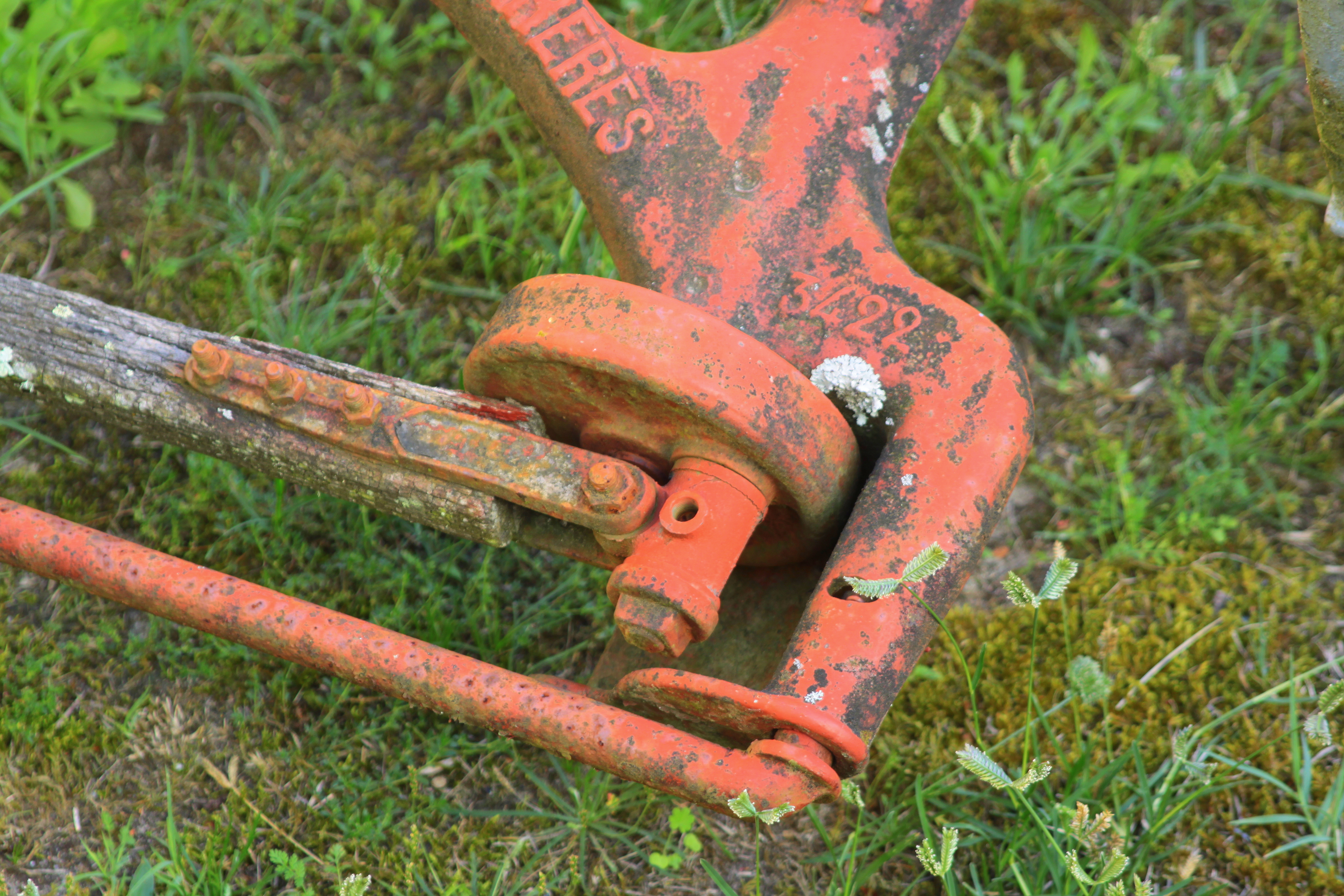 Bielle d'une faucheuse